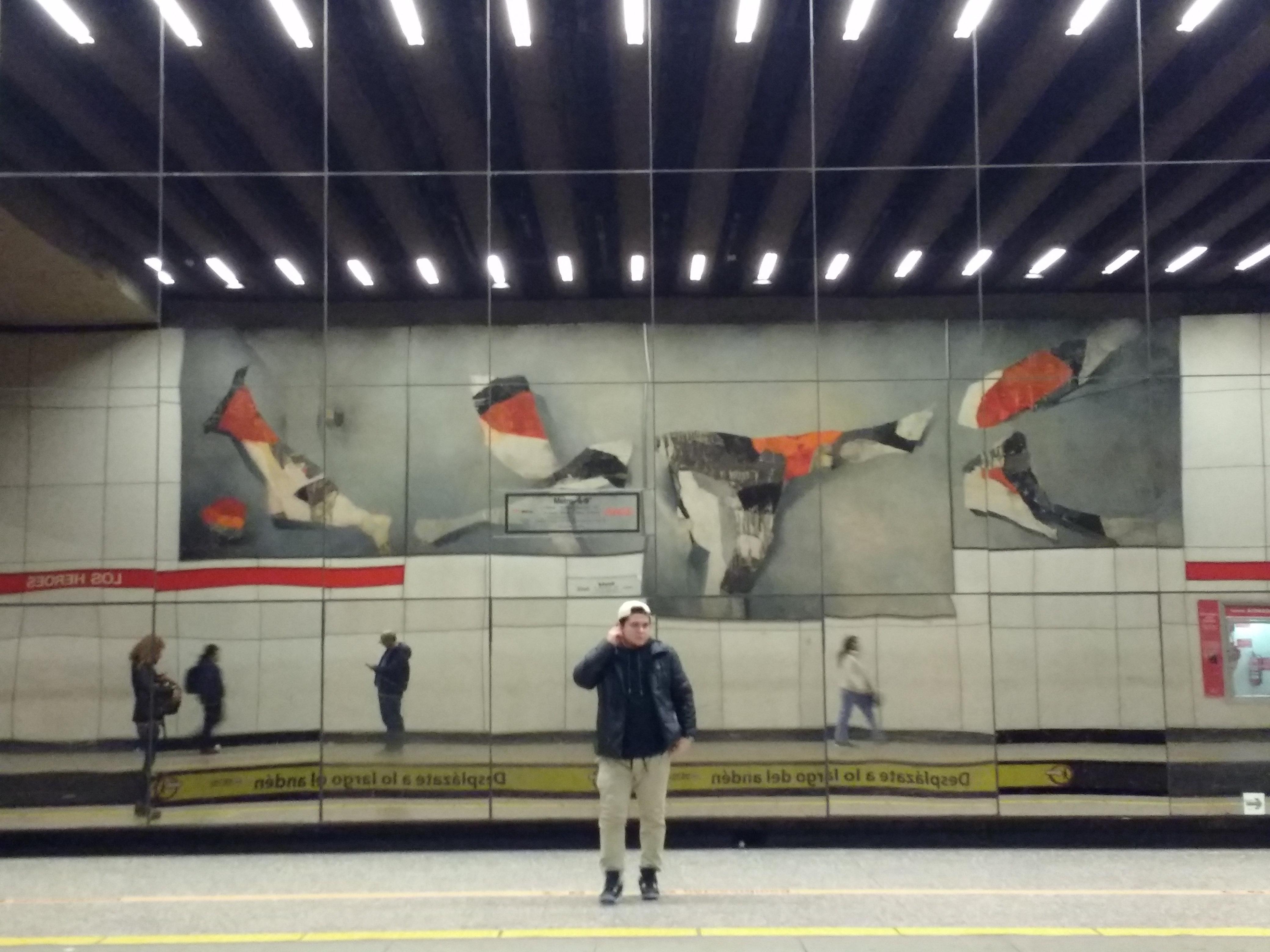 Vista hacia el muro de espejos en el que se refleja Costelacion II (óleo sobre tela y espejos, 380 m²; 1994), obra de Pablo Mc-Clure en la estación de metro Los Héroes, Santiago de Chile.